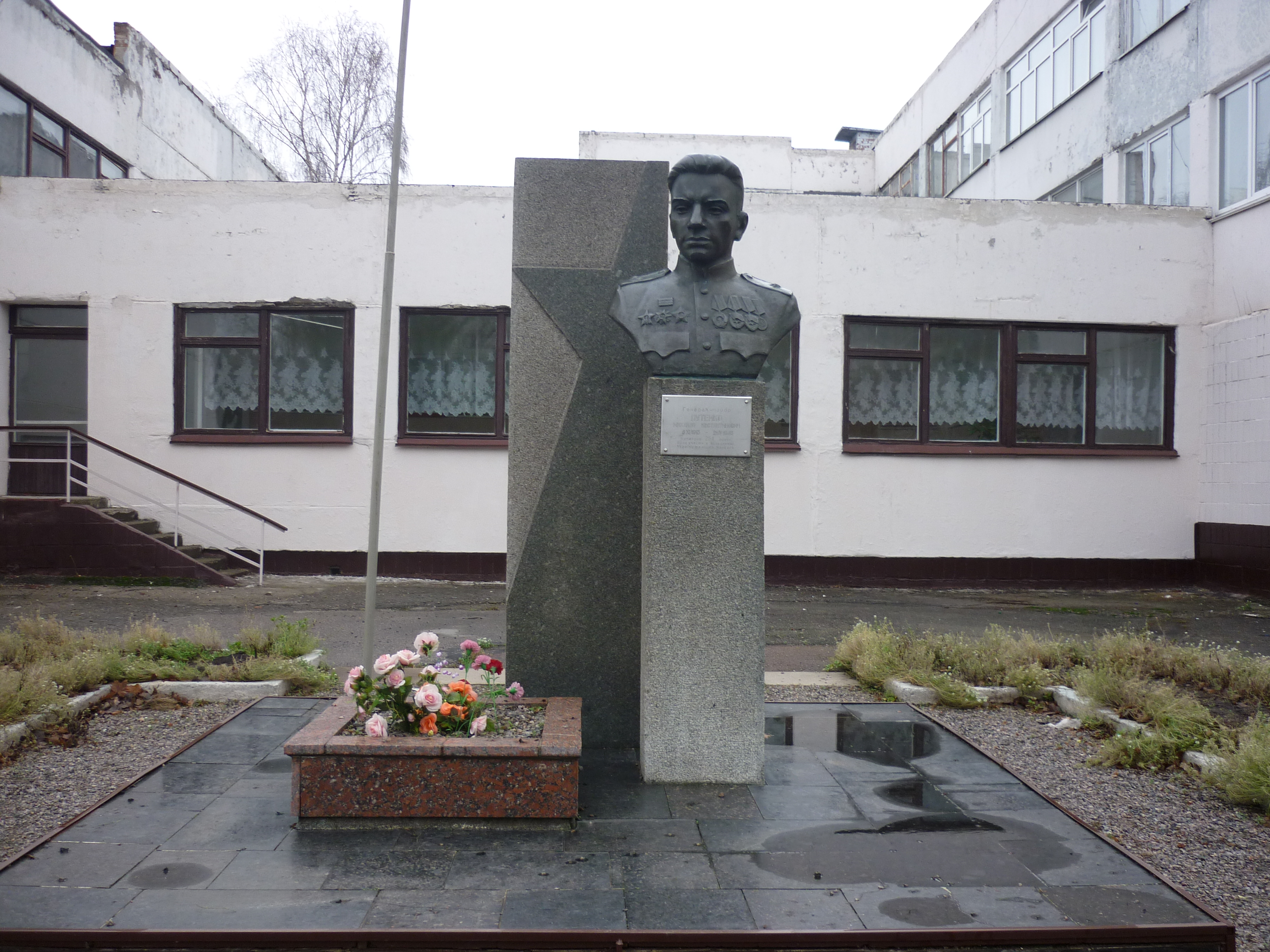 Погруддя на честь Героя Радянського Союзу Путейка М.К. на території школи №27 міста Черкаси